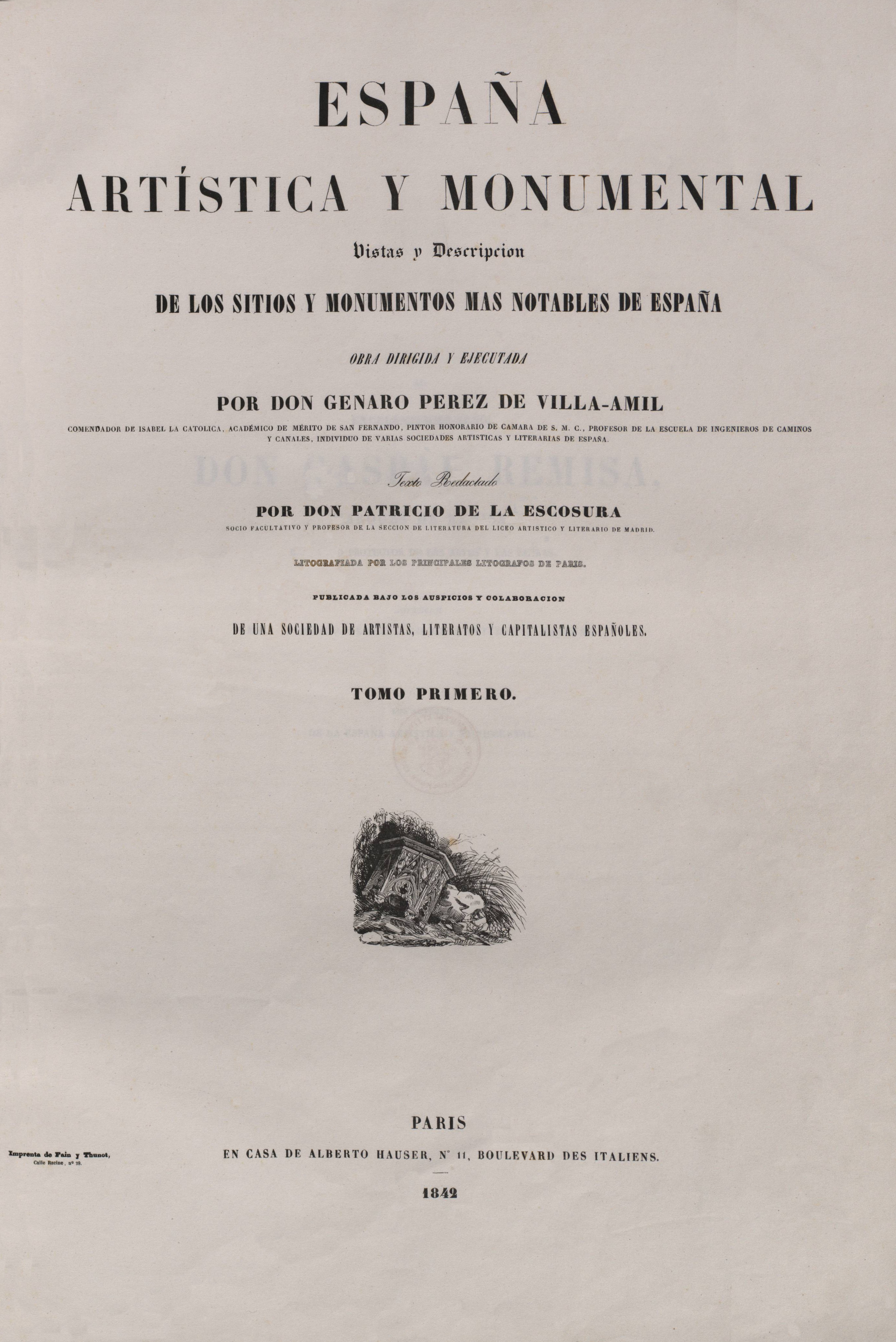 Portada del primer tomo del libro "España artística y monumental", publicado por Jenaro Pérez Villaamil en 1842, en París.